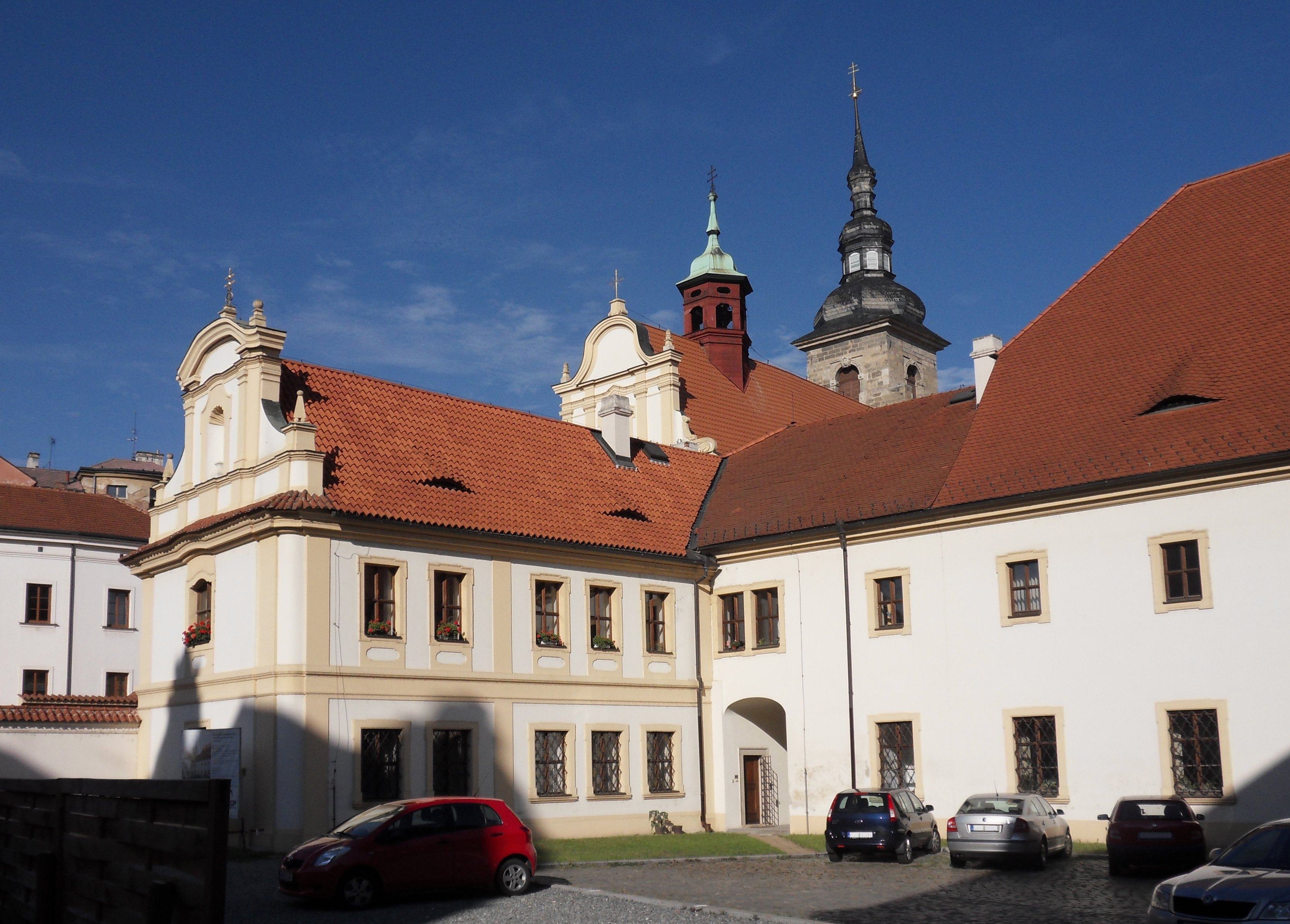 Františkánský klášter v Plzni, Františkánská čp.121